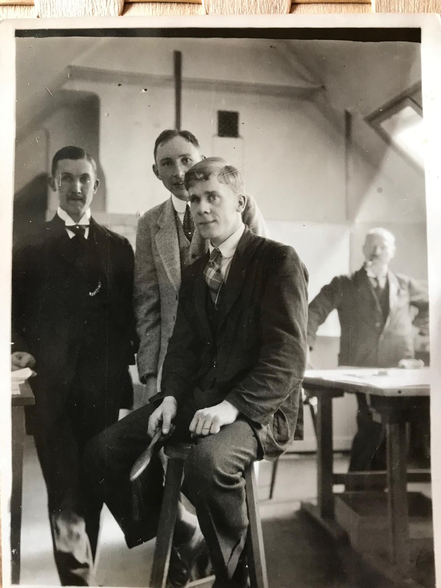 Oscar Nilsson som elev vid Konstfack 1910-talet